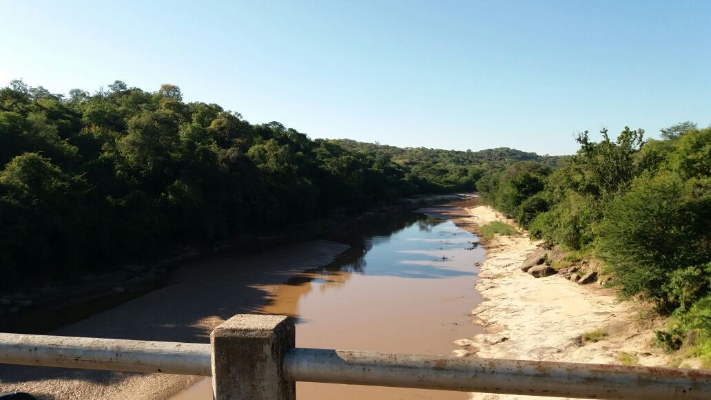 Sengwa Fluss in Simabwe